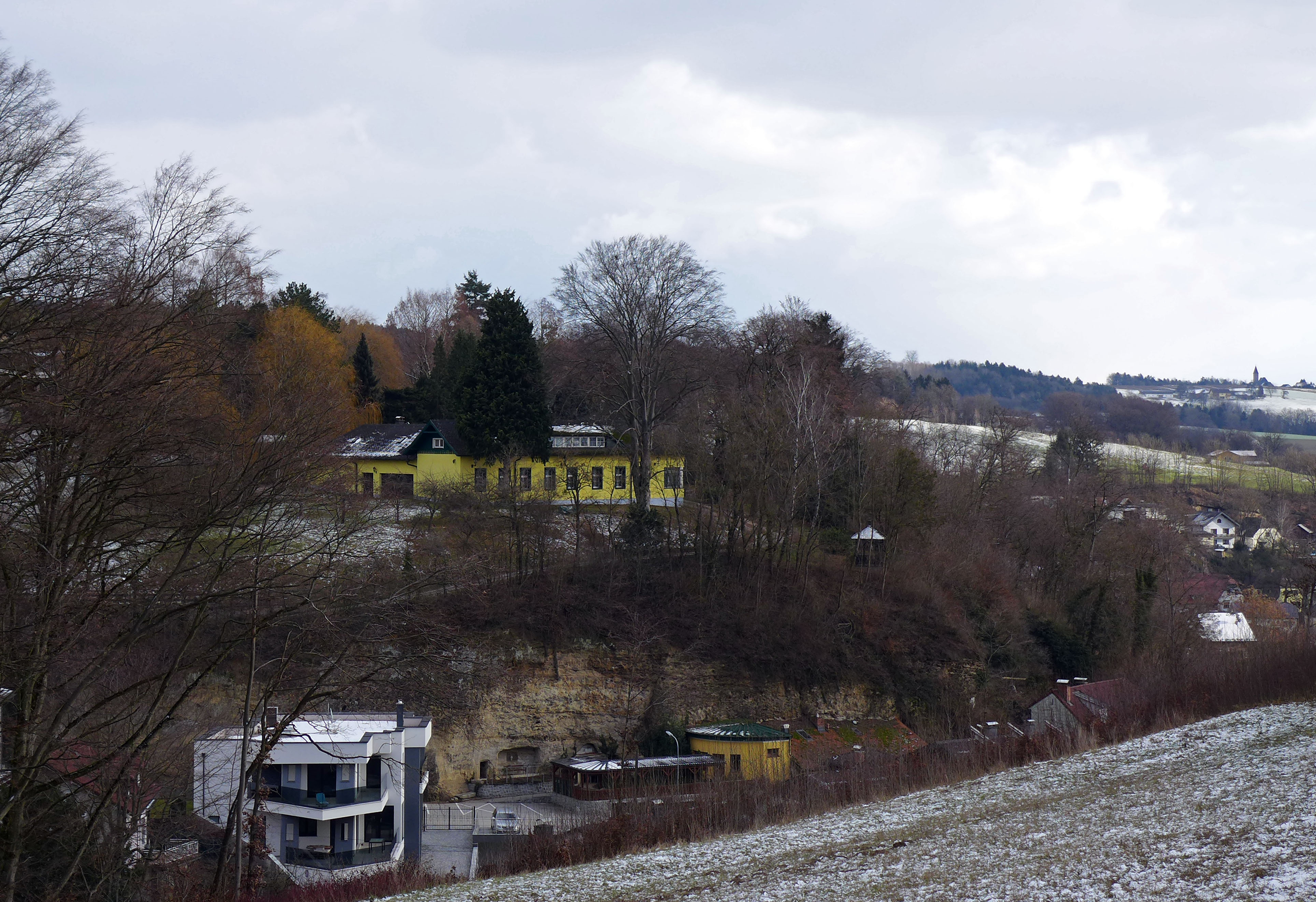 Perg. Anhöhe Dollberg von Westen.